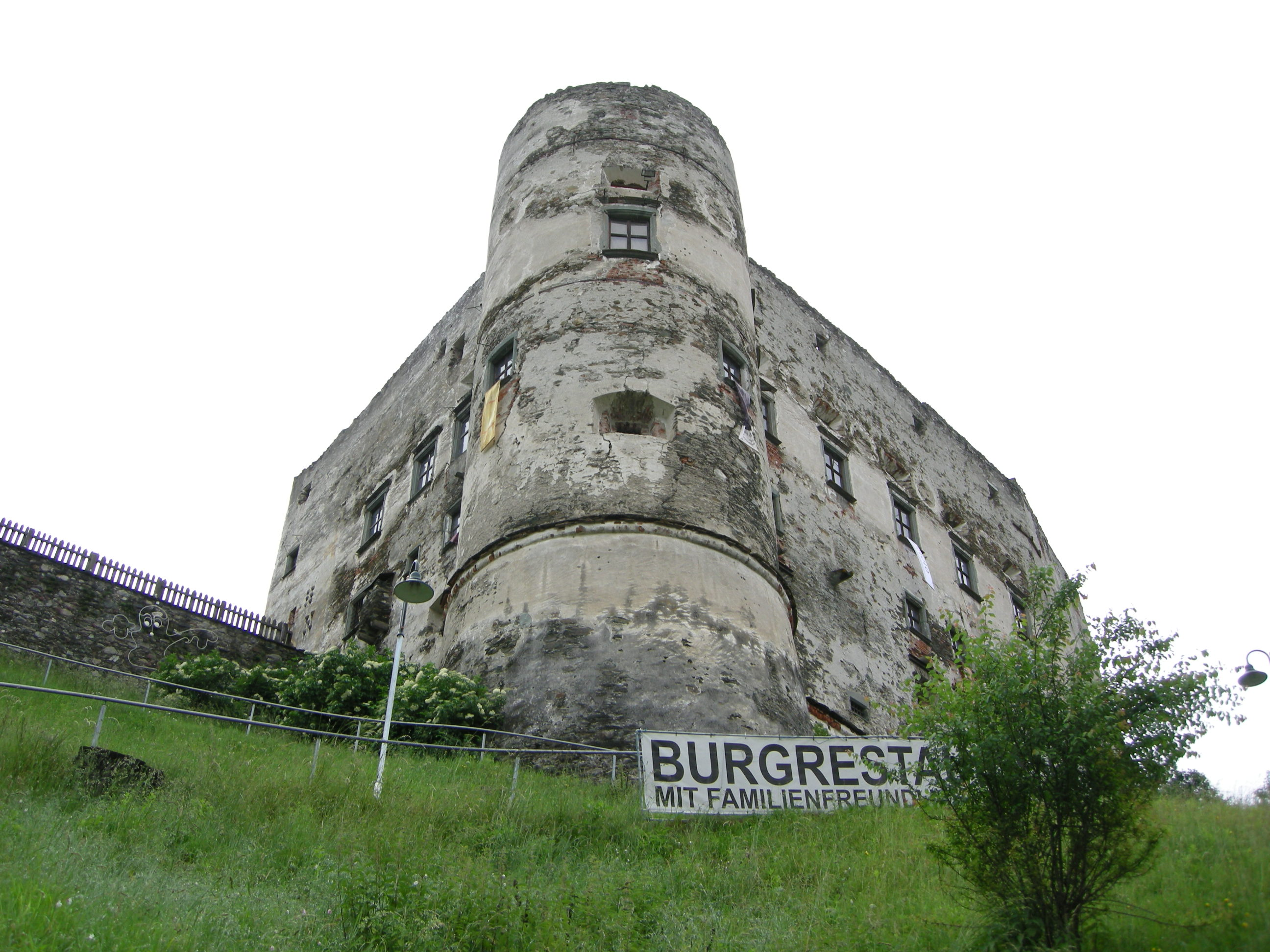 Gmünd, castello